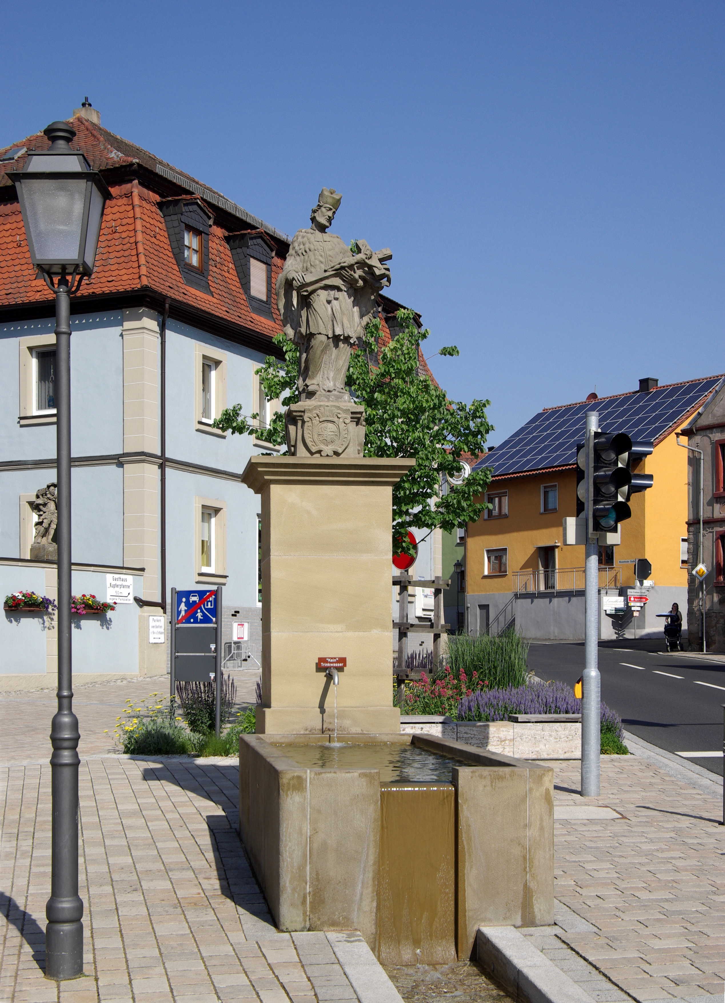 Geiselwind, Marktbrunnen mit Figur des hl. Nepomuk